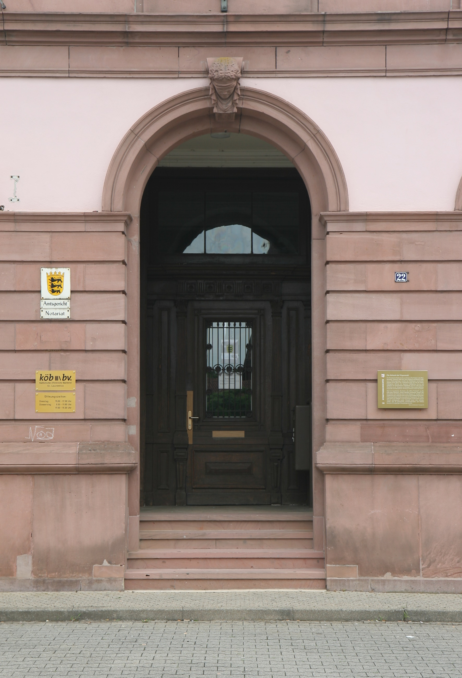 Amtsgericht Kenzingen, Eisenbahnstraße 22 in Kenzingen.